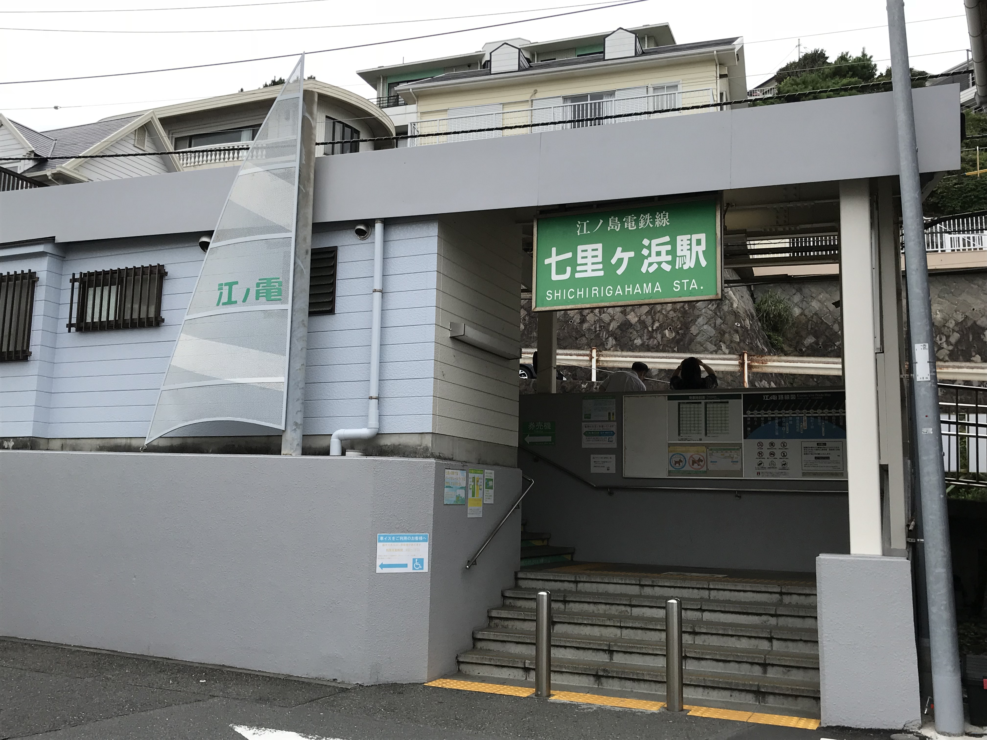 江ノ電七里ヶ浜駅駅舎